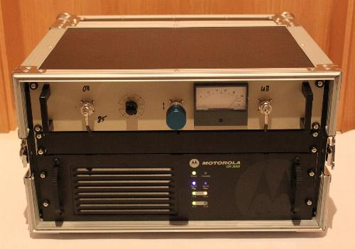 Motorola DR3000 digital/analog Relais. Einsatzbereit mit Antennenweiche in Flightcase montiert